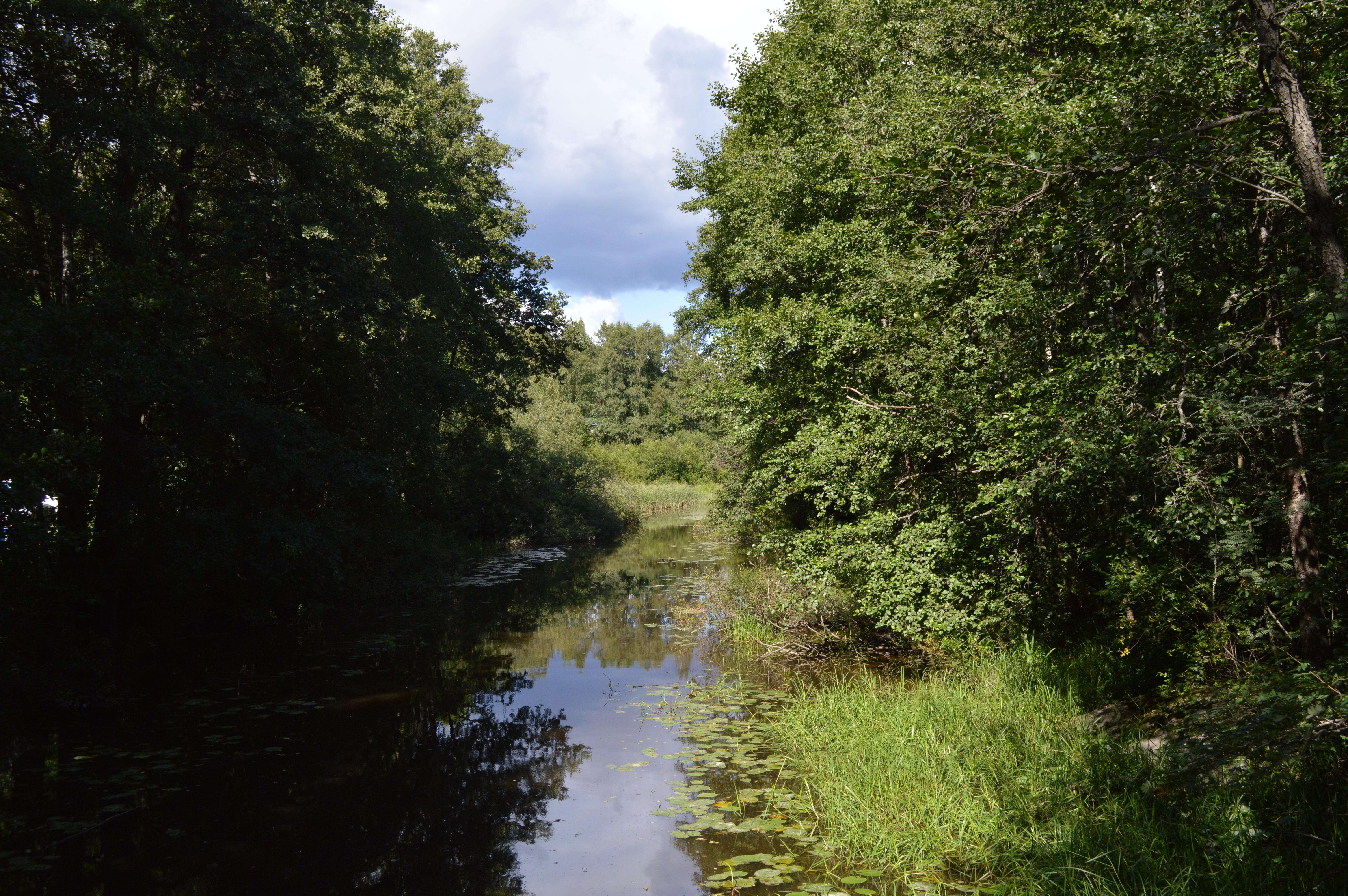 Raaseporijoki eli Snappertunajoki Raaseporin linnan lähellä.